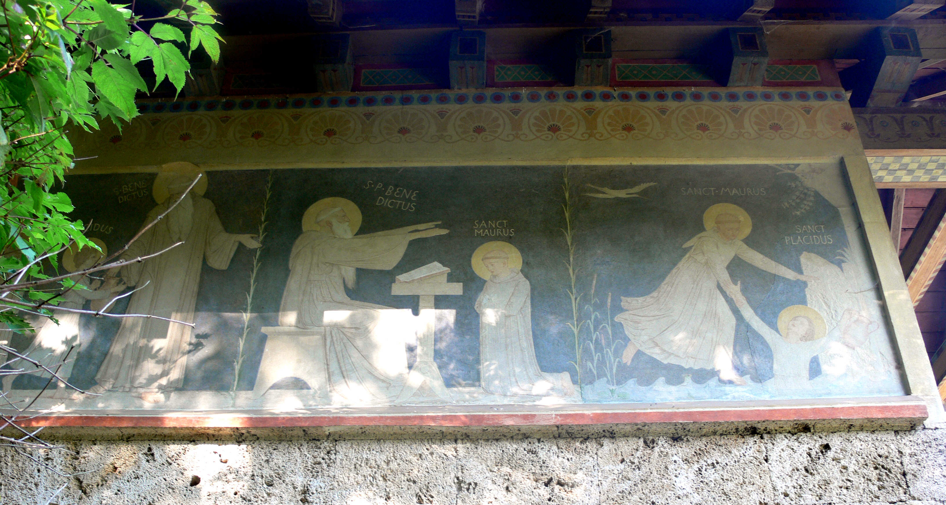 St.-Maurus-Kapelle, Beuron (Donautal), erbaut 1868–1870, Architekt: Desiderius Lenz, Maler: Gabriel Wüger Gabriel Wüger: Wandgemälde zur Mauruslegende an der Seitenwand